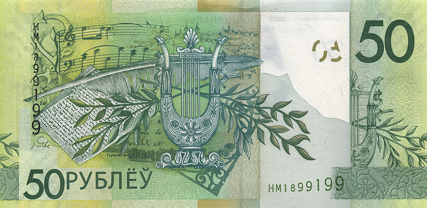 50 белорусских рублей образца 2009 года (оборотная сторона)